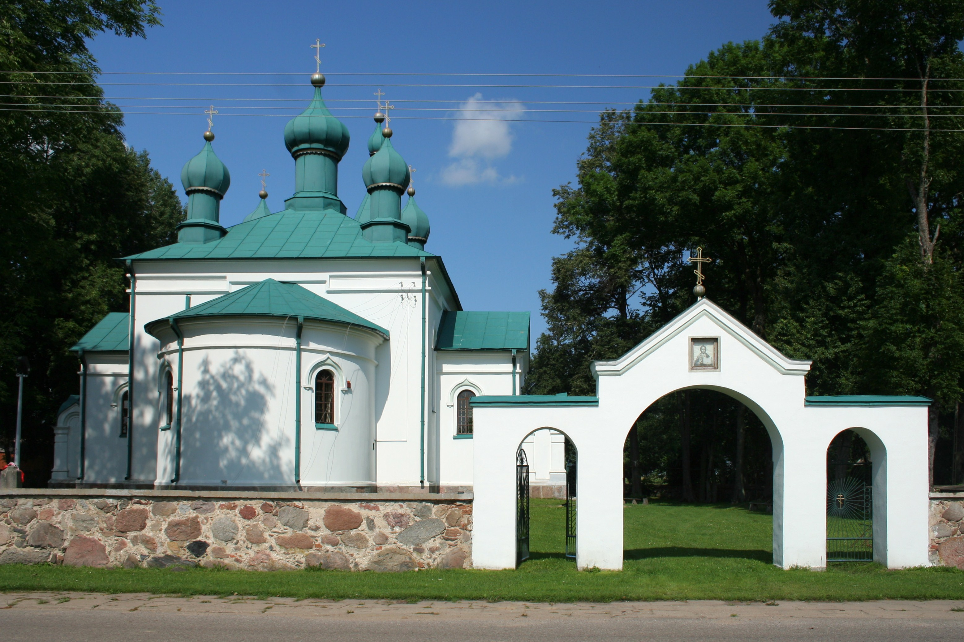 Cerkiew Wniebowstąpienia Pańskiego w Nowoberezowie.